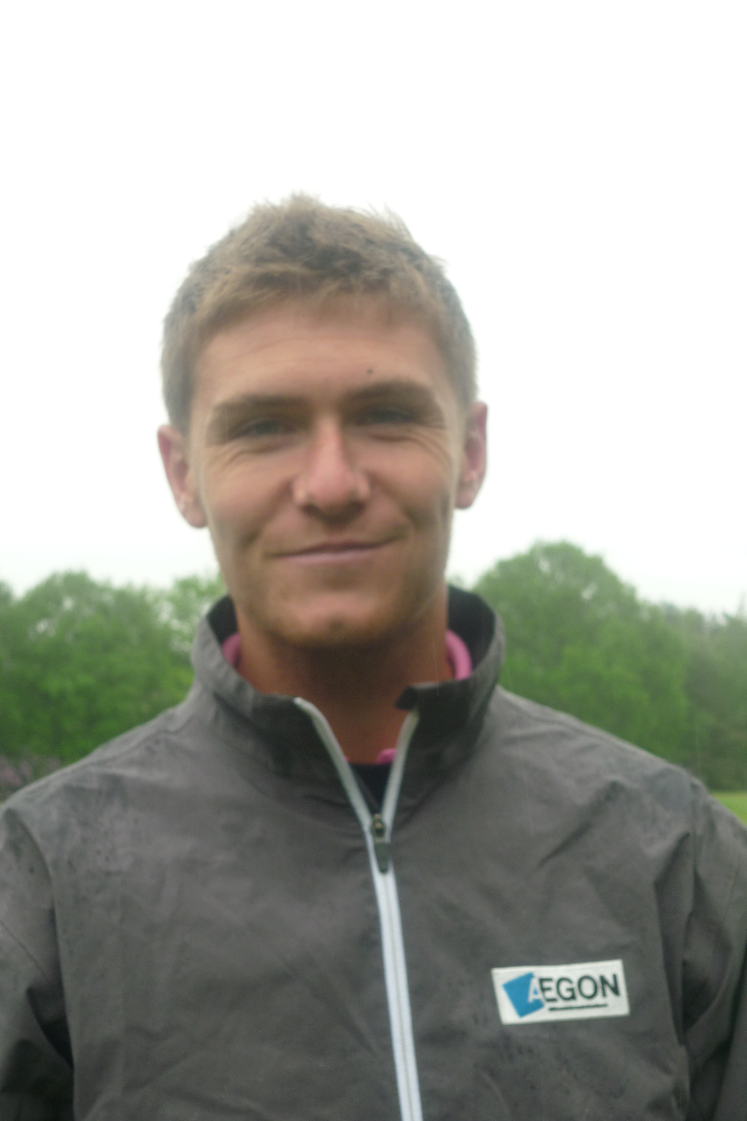 Lloyd Saltman at Rinkven GC for Telenet Trophy